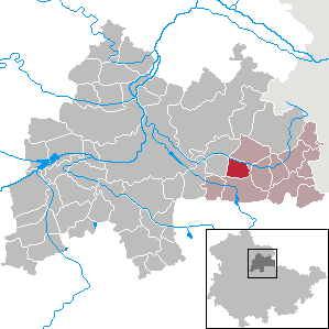 Ellersleben in Thuringia - District Sömmerda